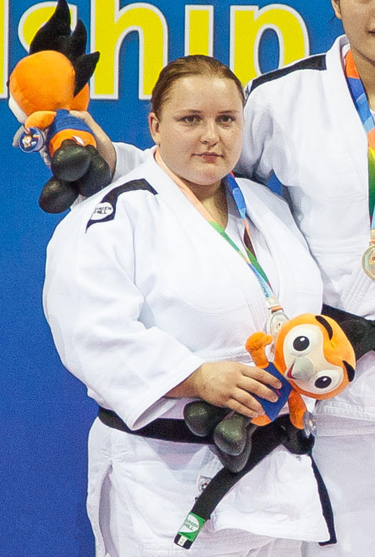 Svitlana Iaromka. Foto: Sgt Johnson Barros